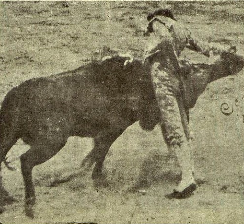 El diestro granadino Miguel Morilla "El Atarfeño" toreando por gaoneras a un novillo en la Plaza de toros de Jaén